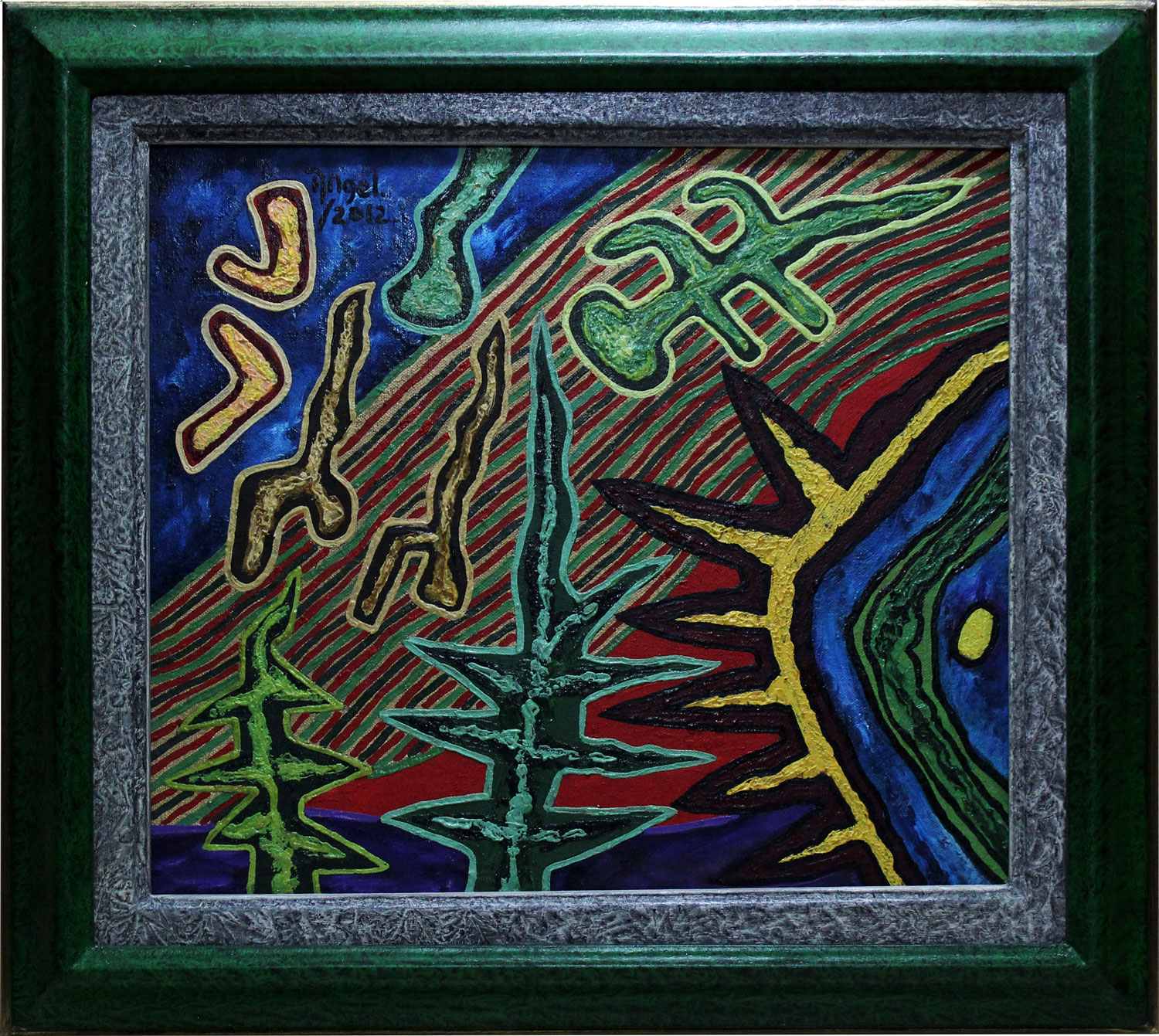 Pintura, Oleo sobre lienzo,38 x 31 cms composición zoo morfa con características solares